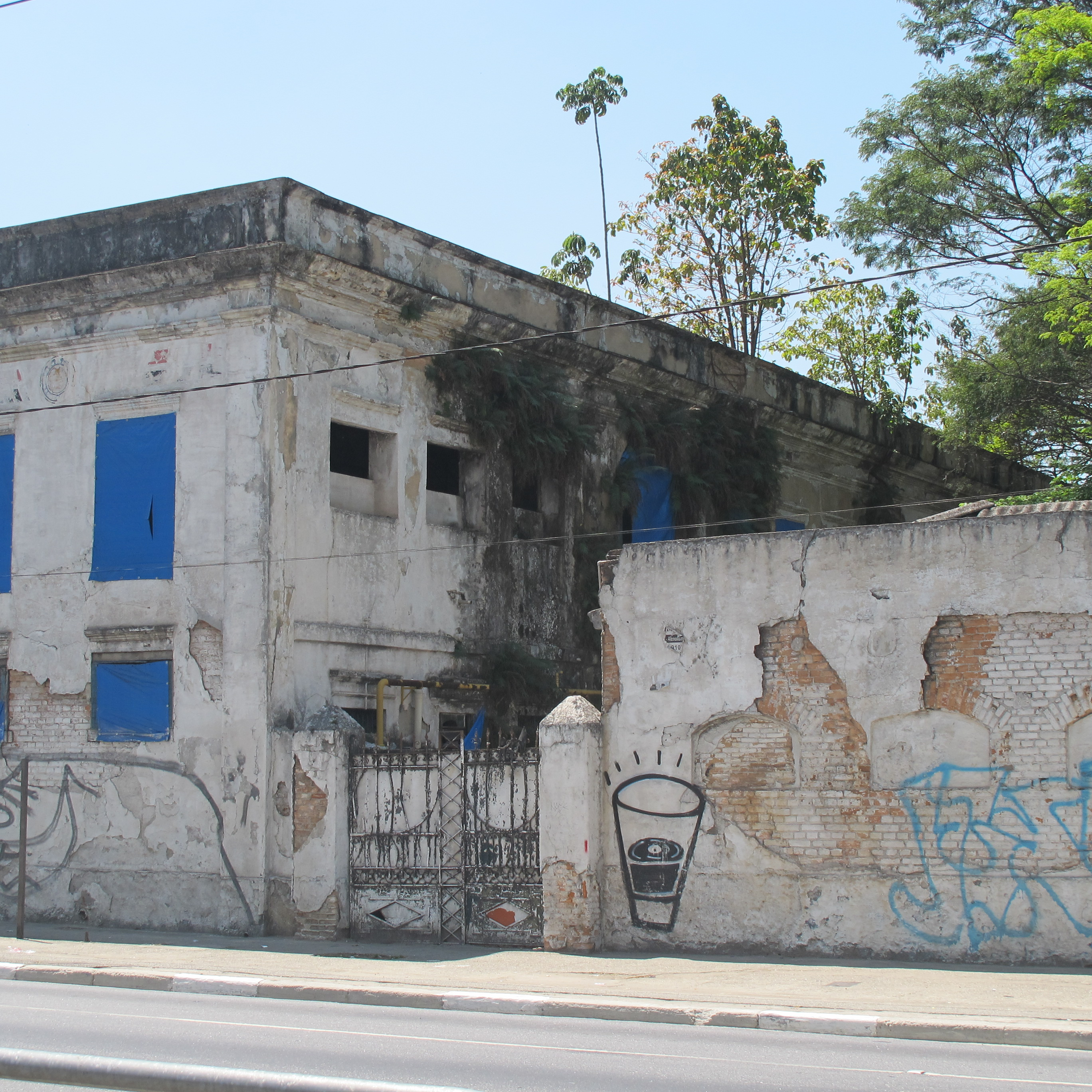 Fachada do Quartel do Segundo Batalhão de Guardas vista da calçada oposta a construção na Avenida do Estado em São Paulo, SP, Brasil.